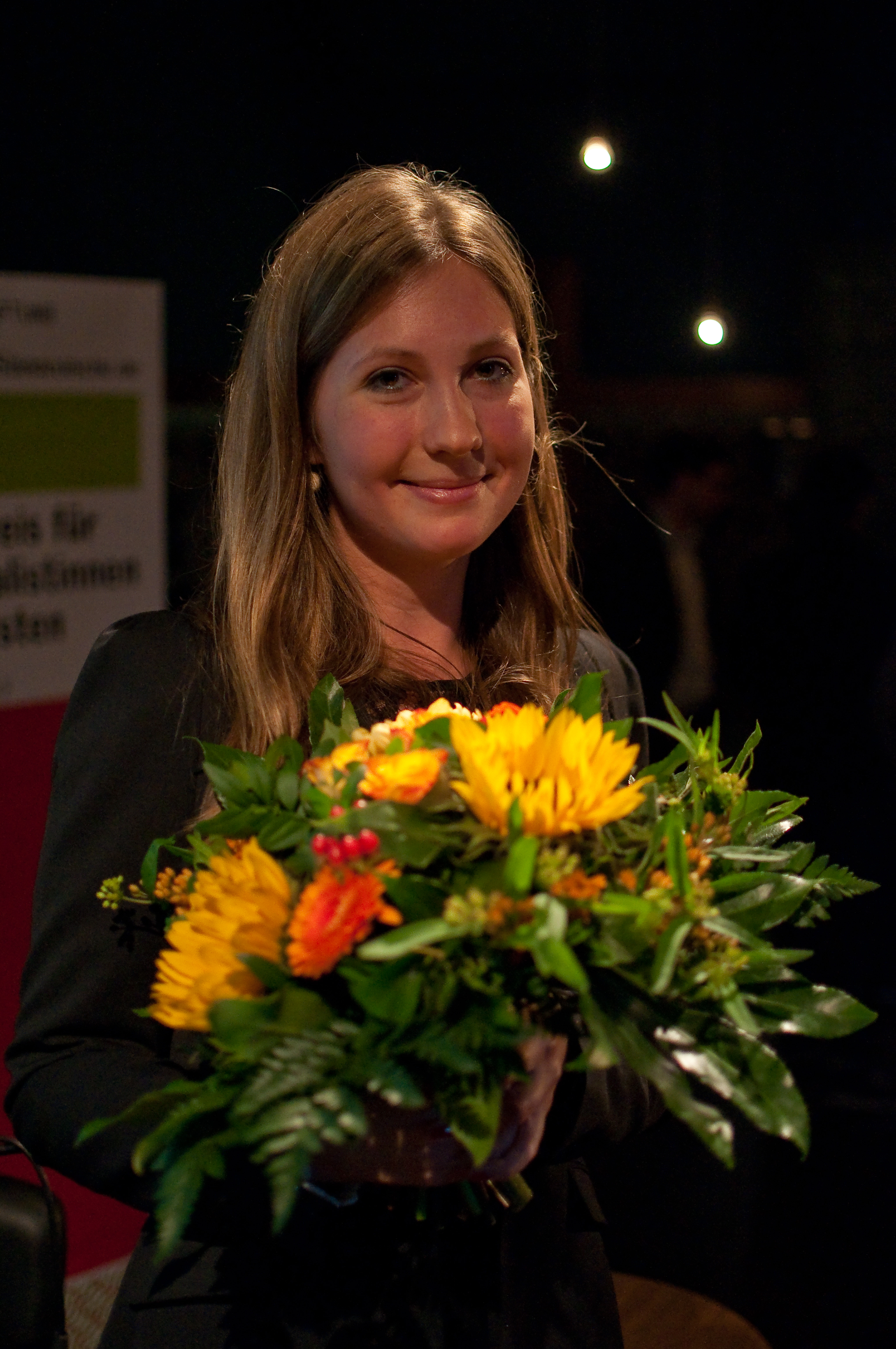 Maris Hubschmid bei der Verleihung des Reportagepreises für junge Journalisten 2013